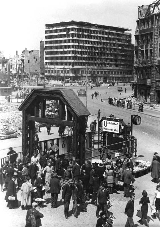 Berlin, Potsdamer Platz mit U-Bahn-Eingang Zentralbild-Cürlis Berlin im Frühjahr 1946 Potsdamer Platz: Blick vom Haus Vaterland nach Nordwesten auf das Columbushaus. 261-46 Information added by Wikimedia users.